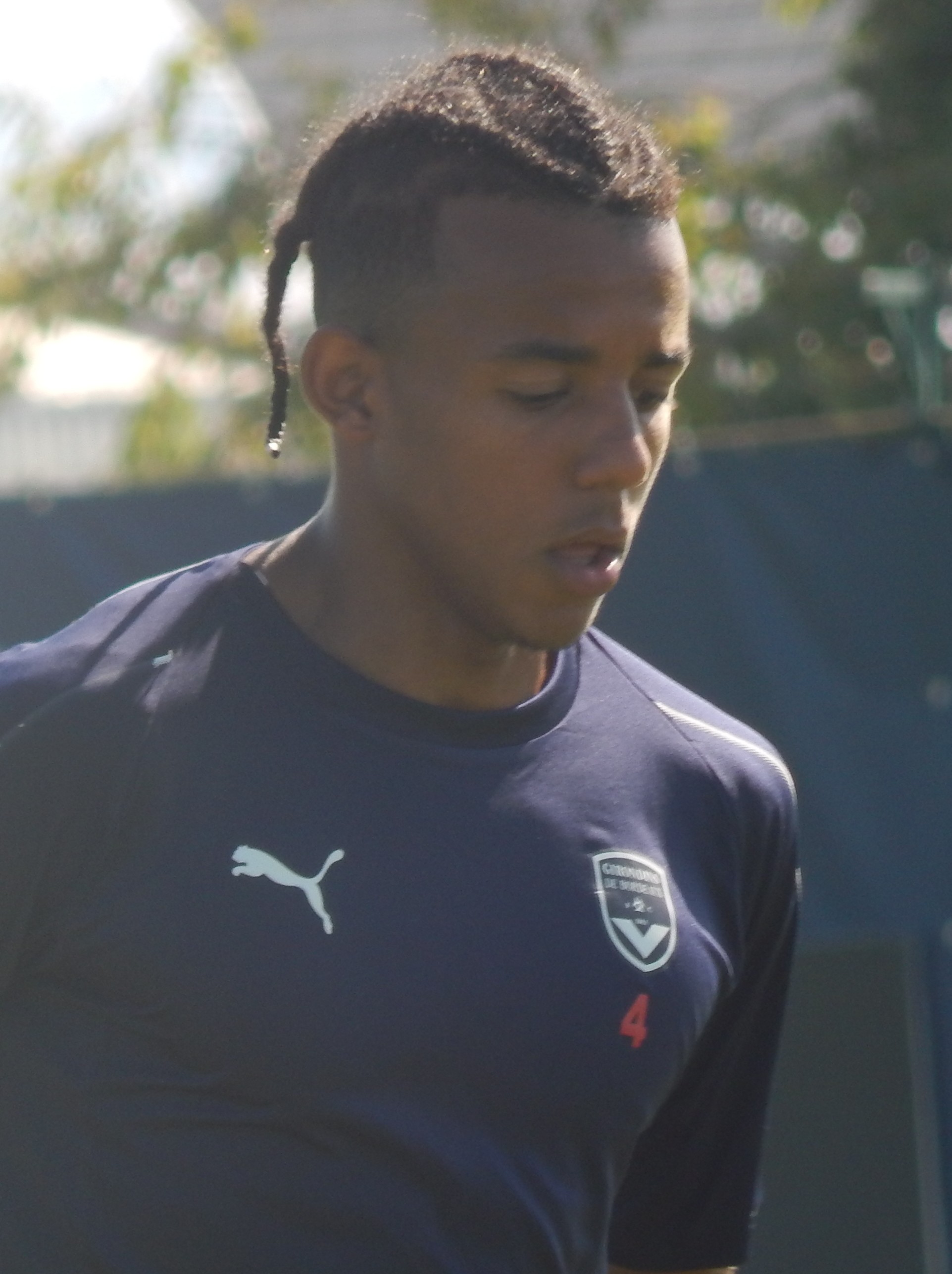 Jules Koundé à l'entraînement avec les Girondins de Bordeaux le 23 juillet 2018.